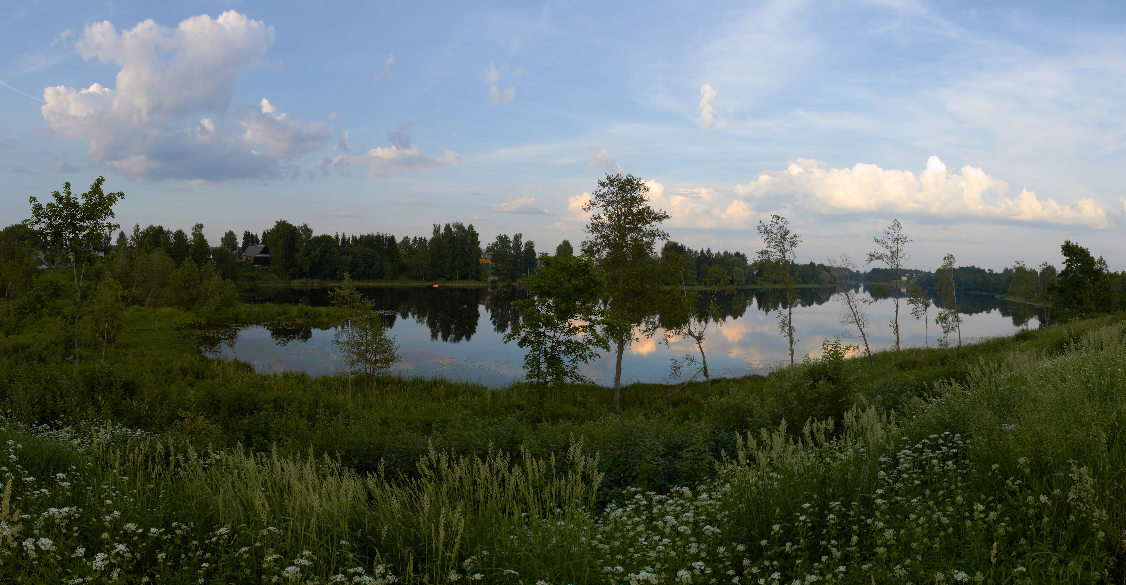 Väimela Mäejärv 2011. aastal. Panoraam mitmest fotost